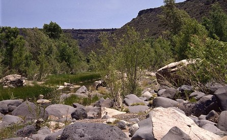 Agua Fria River in Agua Fria National Monument, Arizona